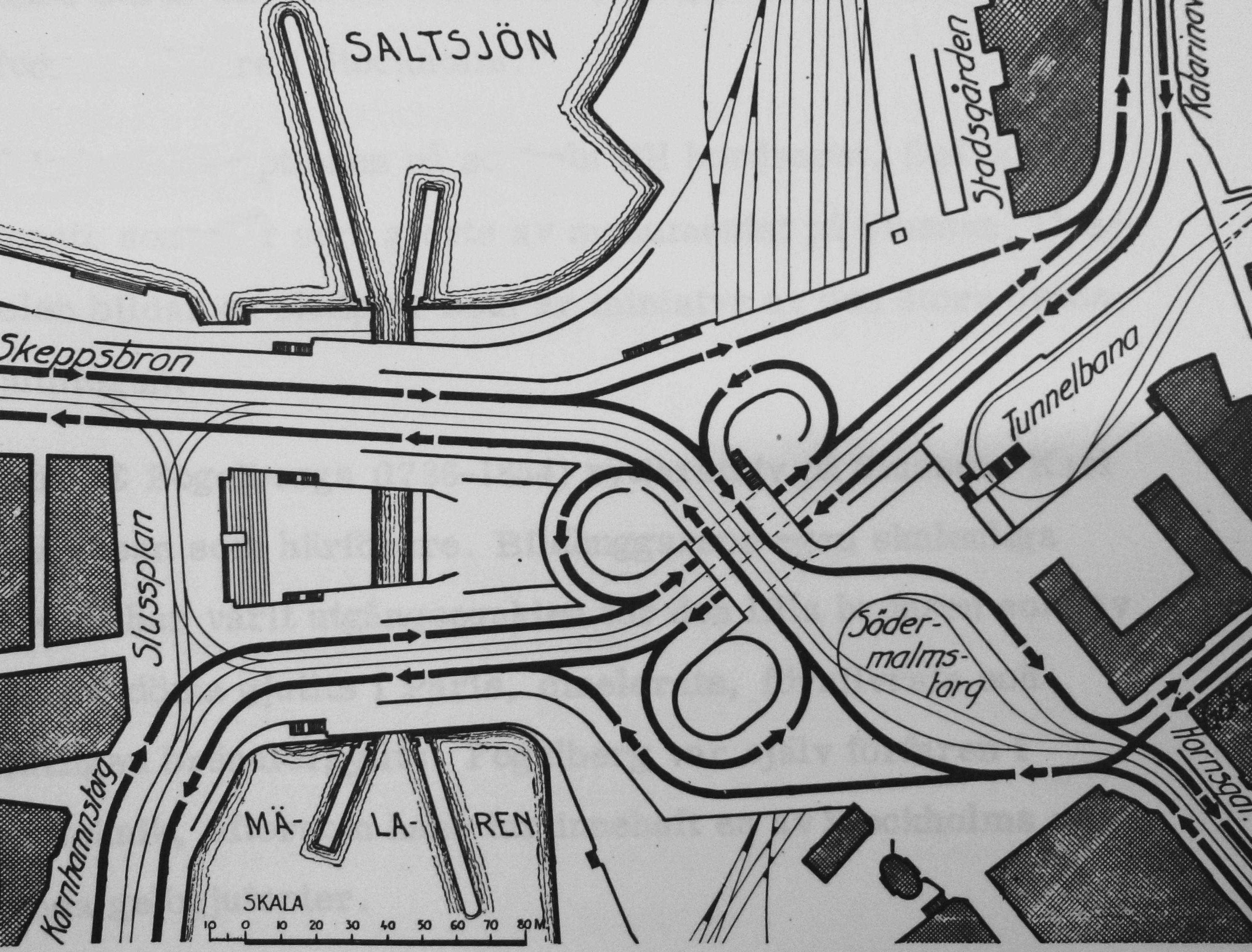 Trafikföringen i Slussen 1935, norr är till vänster (Obs! vänstertrafik)